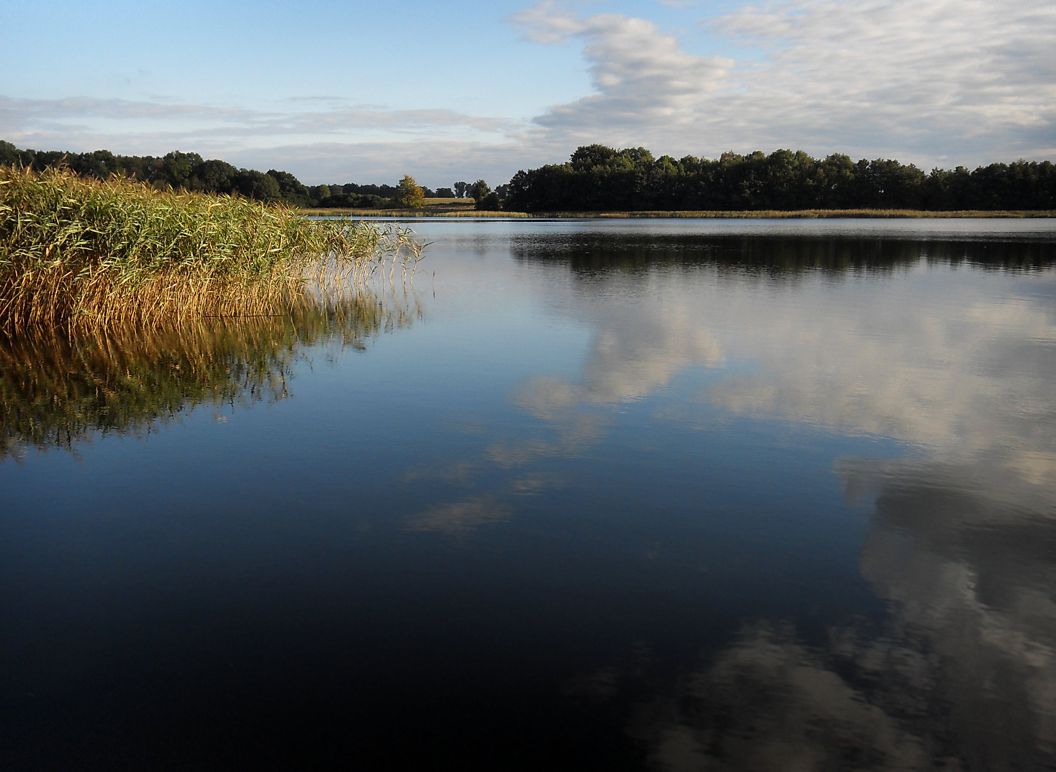 Bibowsee in Mecklenburg-Vorpommern (Sternberger Seenlandschaft) Datum: 29.09.2010 Urheber: RuckSackKruemel Quelle: Flickr URL des Bildes auf Flickr